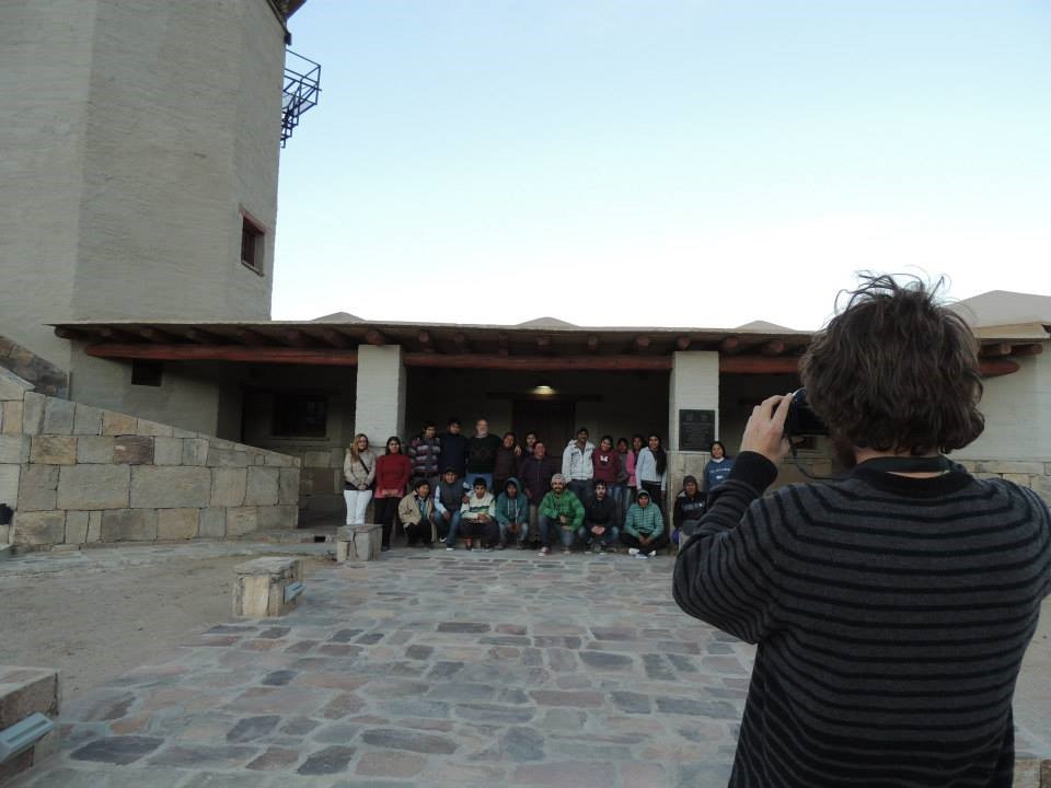 Reuniones en el Museo de Barranca Larga